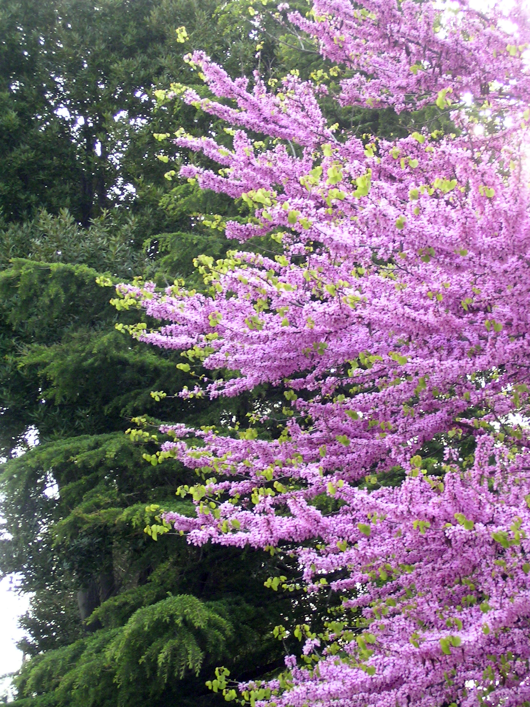 Cercis siliquastrum, Fabaceae, Caesalpinioideae, árbol del amor, árbol de Judea o de Judas, foto tomada por mi misma en un viaje por Camarga francesa